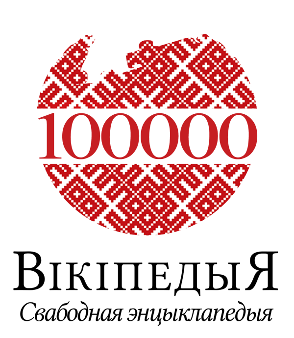 Лагатып Беларускай Вікіпедыі да напісання юбілейнага 100000 артыкула